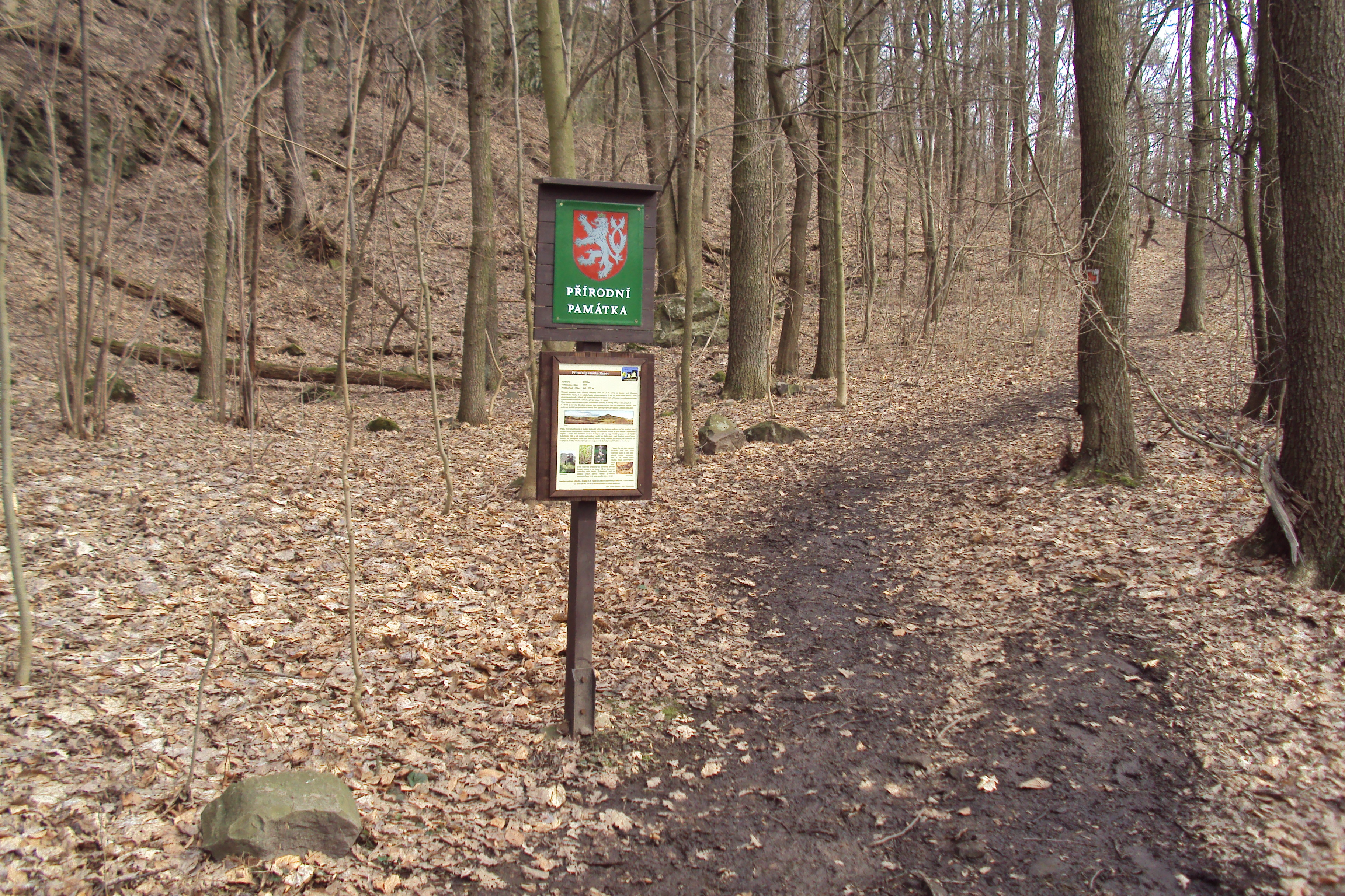 Hranice přírodní památky na Ronově